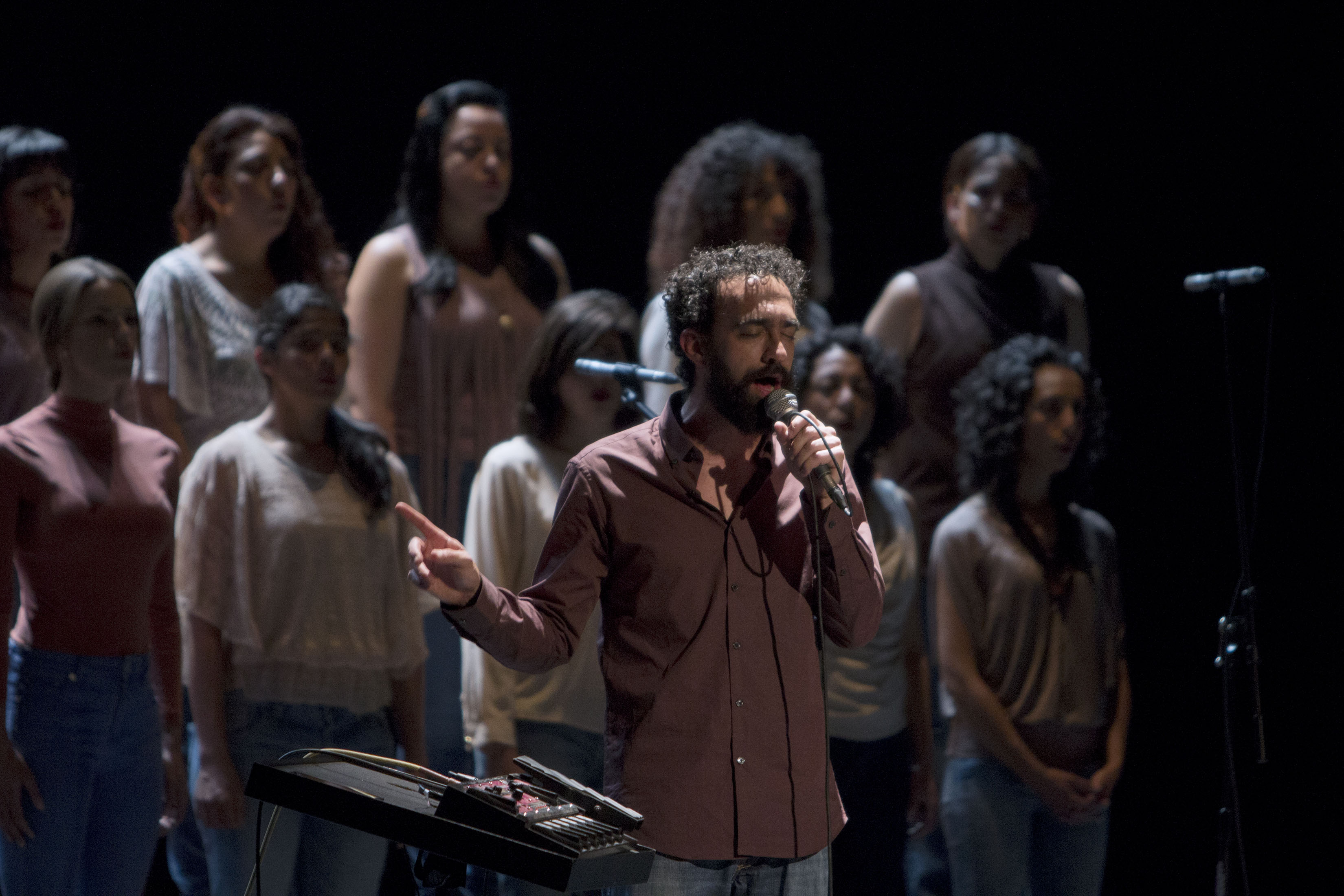 Sábado 1 de octubre de 2016 En el Teatro de la Ciudad Esperanza Iris se presentó el espectáculo Al pie de un árbol. Celebrando el canto Cardenche, a cargo de Los Cardencheros de Sapioriz y el Coro Acardenchado, dirigido por Juan Pablo Villa. Fotografía: Maritza Rios / Secretaría de Cultura CDMX